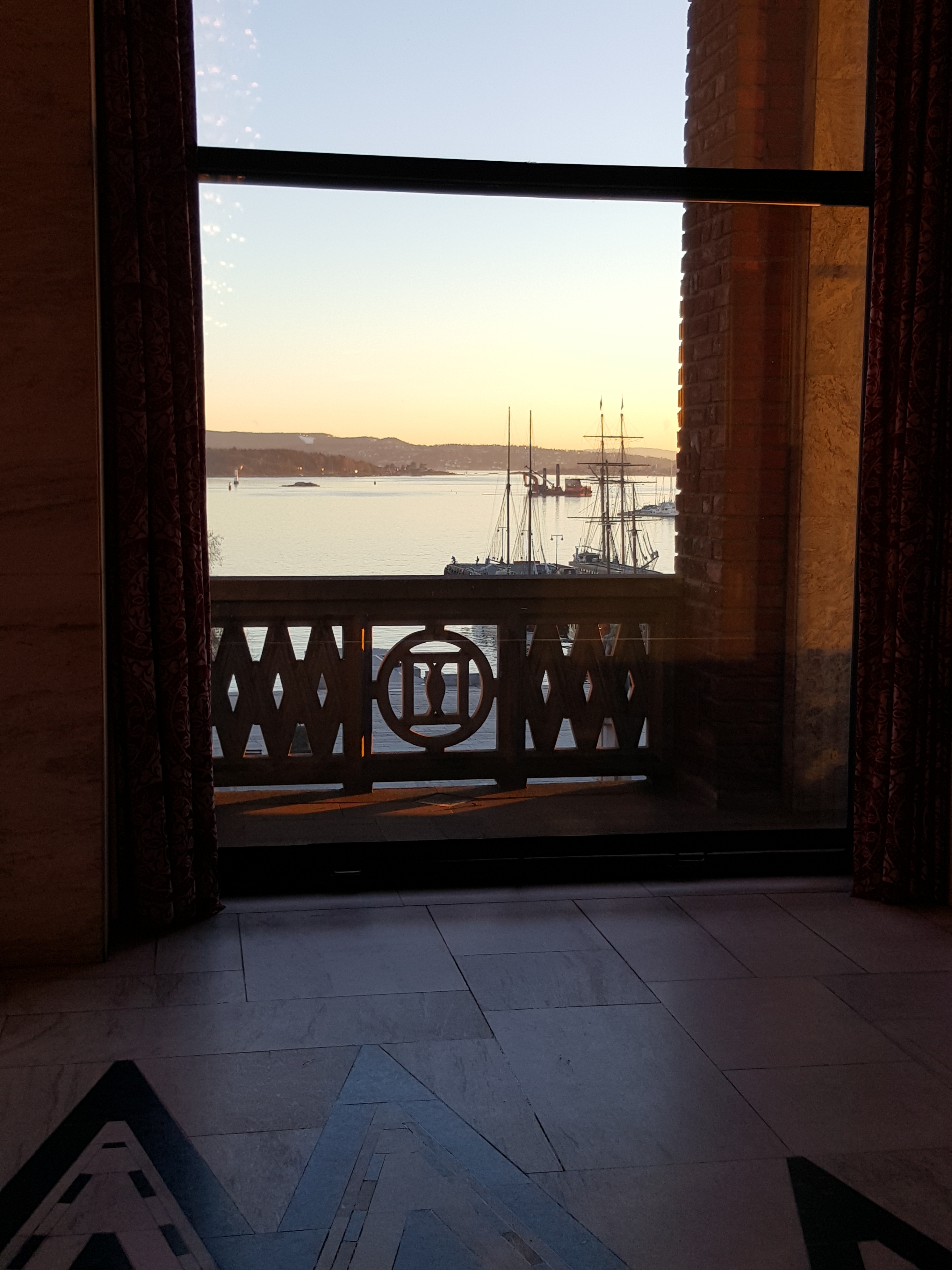 Udsigten ud over fjorden fra Banketsalen på Oslo Rådhus